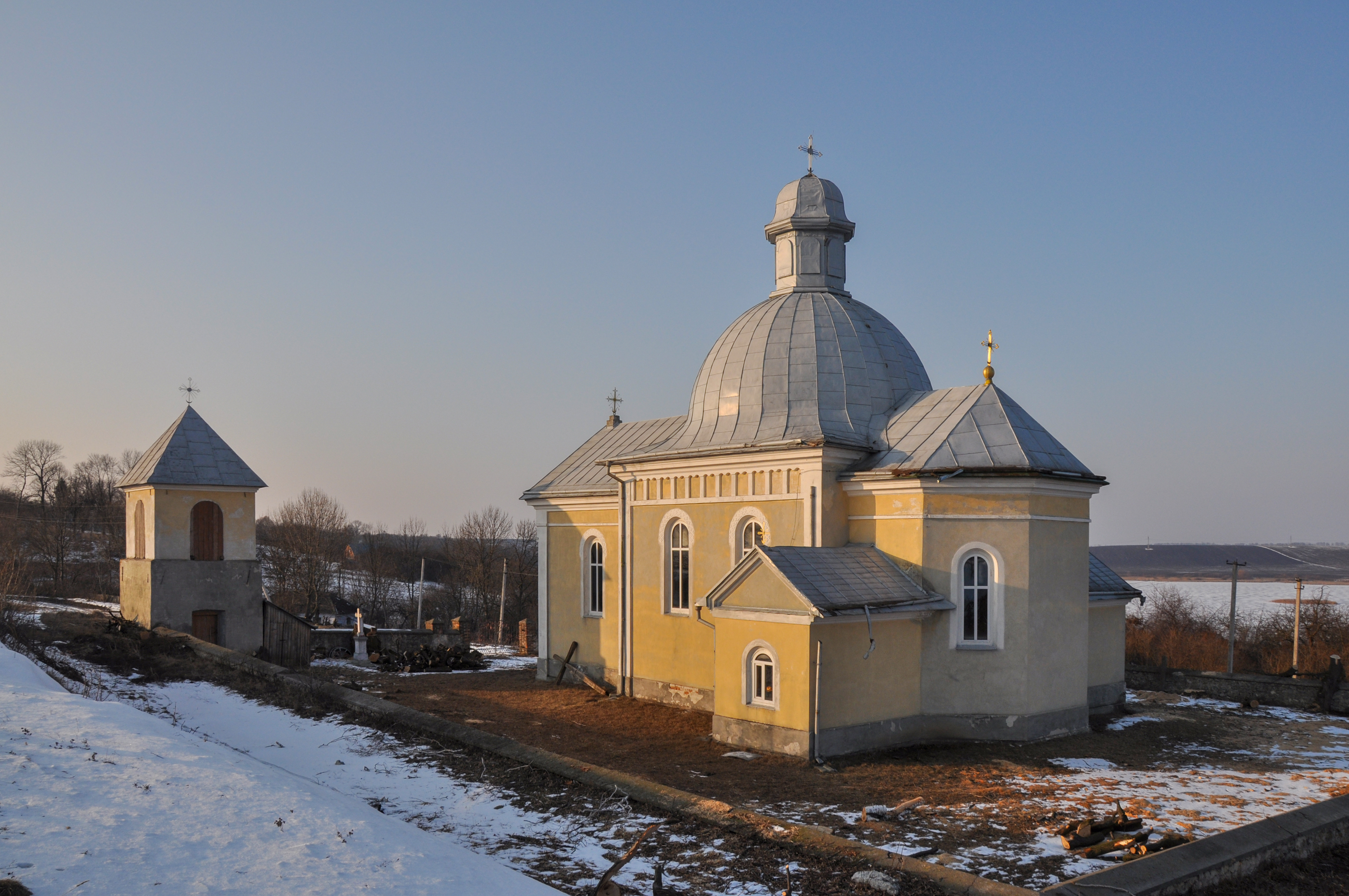 Церква Св. Михаїла (мур.), Рожиськ